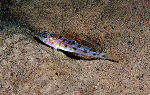 Picture of Lesueurigobius friesii